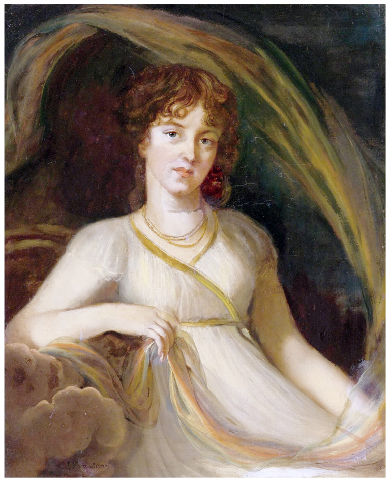 Екатерине Осиповне Тюфякина, ур. Хорват (1777—1802)